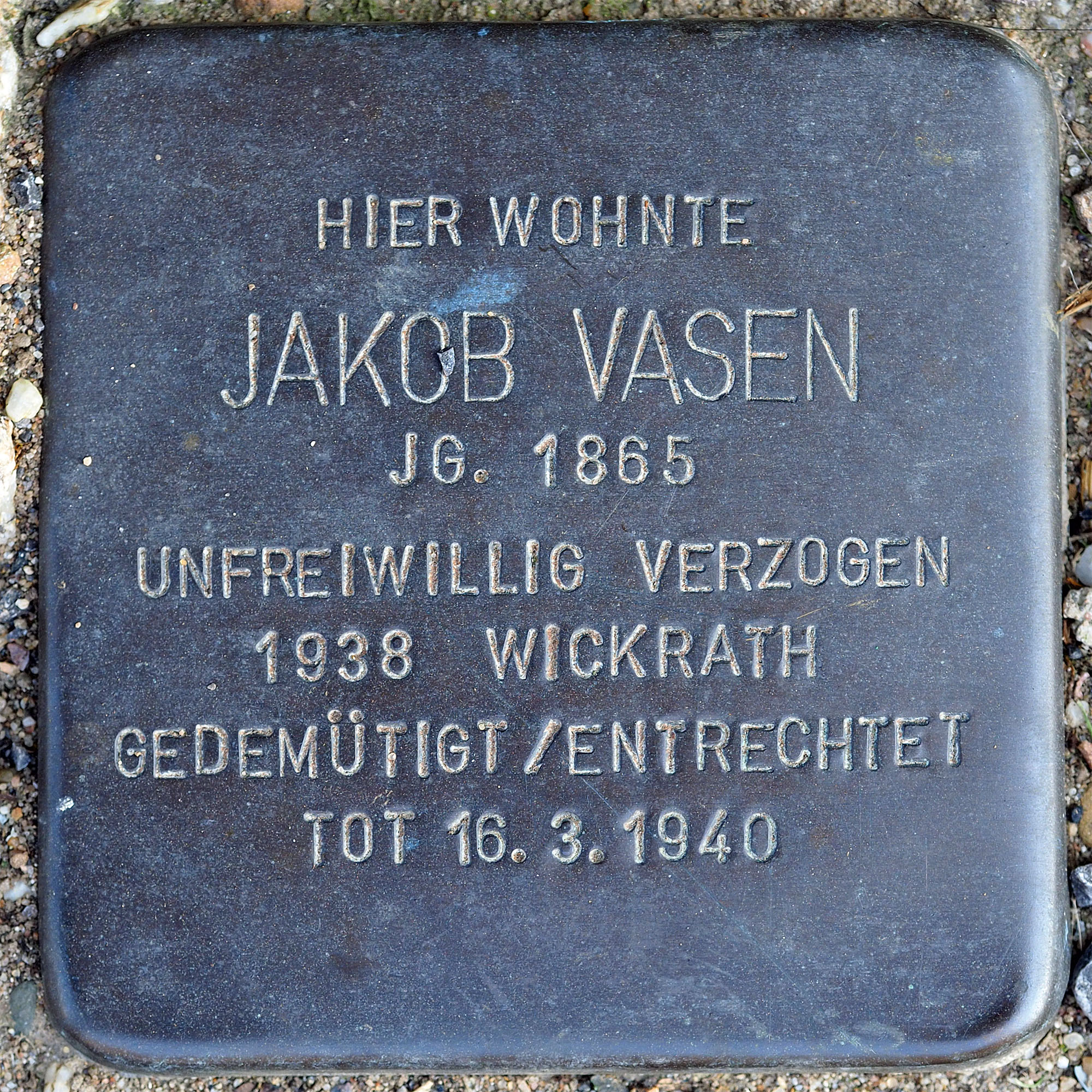 Stolpersteine GV: Vasen, Jakob